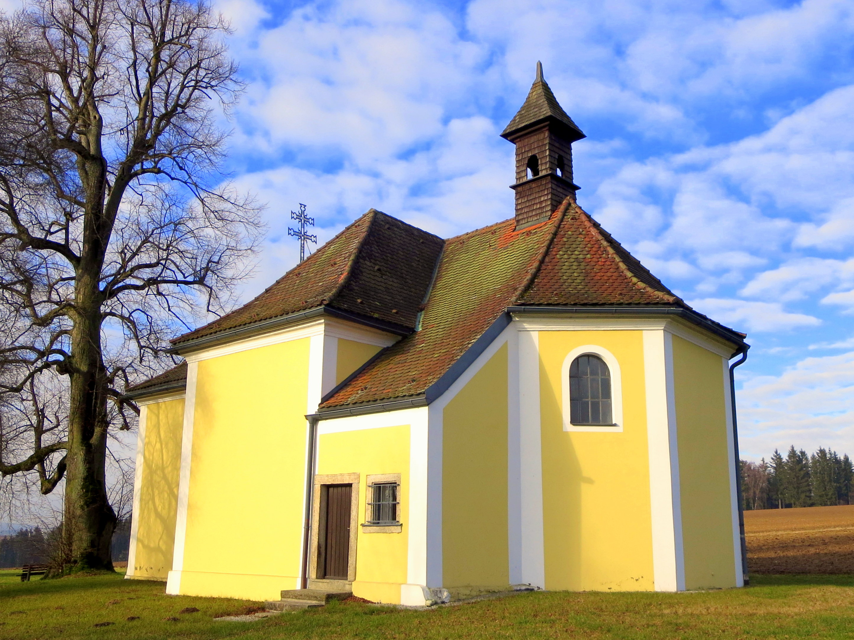 Klausenkapelle